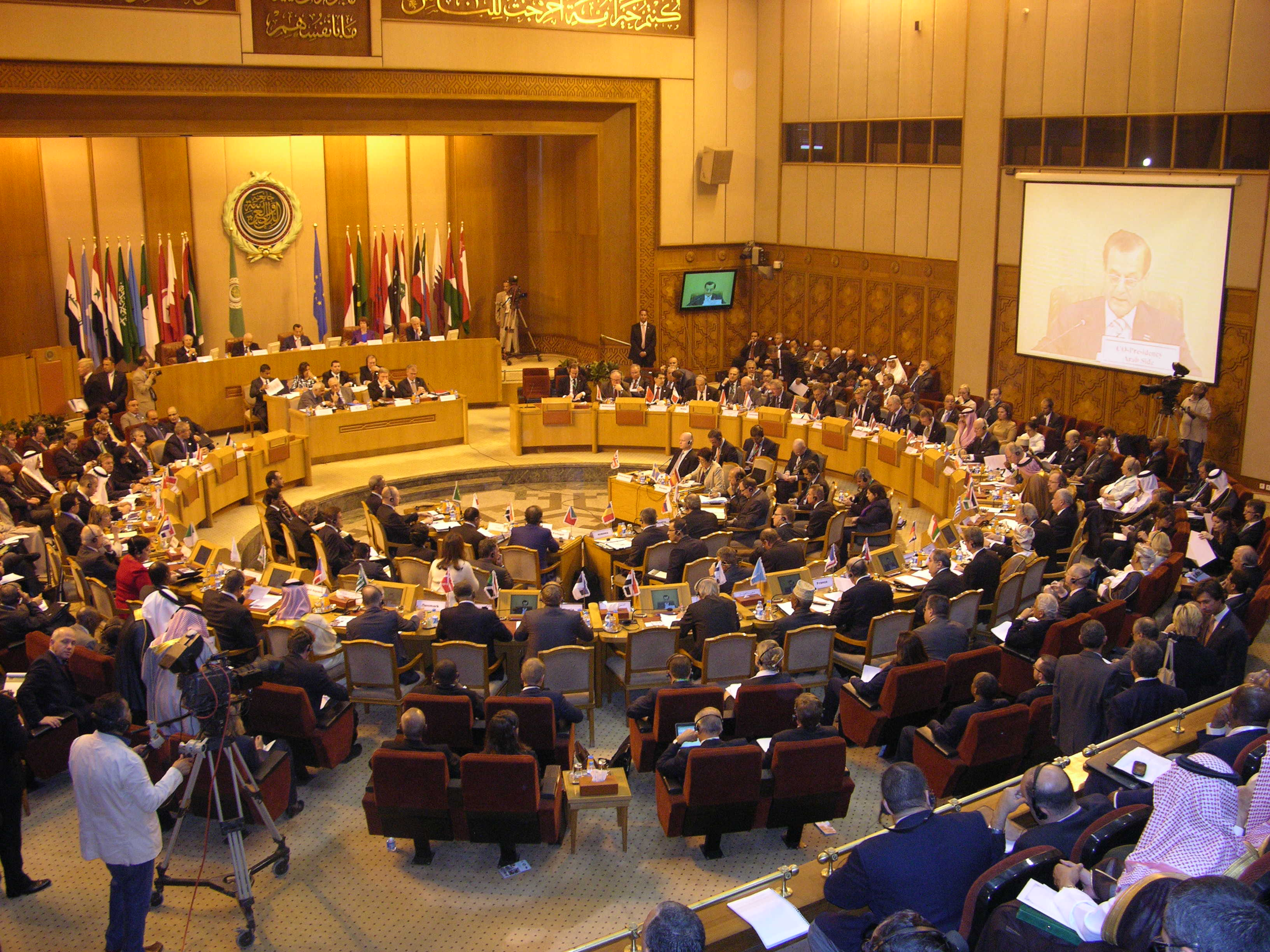 Ο Υπουργός Εξωτερικών Δημήτρης Αβραμόπουλος μετέβη στην Αίγυπτο, προκειμένου να συμμετάσχει στη Σύνοδο των Υπουργών Εξωτερικών Ευρωπαϊκής Ένωσης-Αραβικού Συνδέσμου και στη συνάντηση της Ομάδας Δράσης ΕΕ-Αιγύπτου. Με την ευκαιρία της επίσκεψής του είχε συνάντηση με τον με τον Πατριάρχη Αλεξανδρείας κ.κ. Θεόδωρο Β